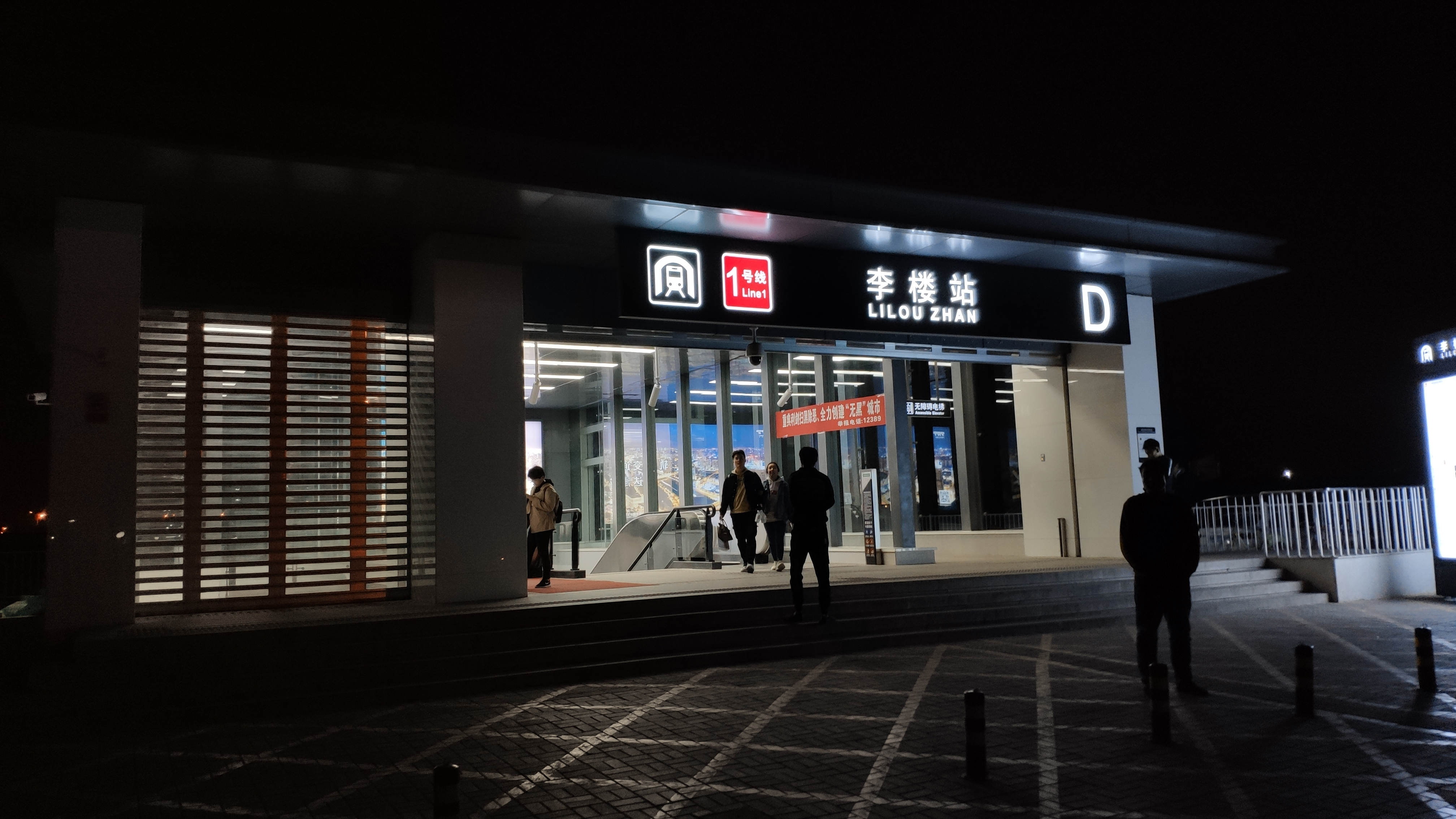 天津地铁1号线李楼站的D出入口